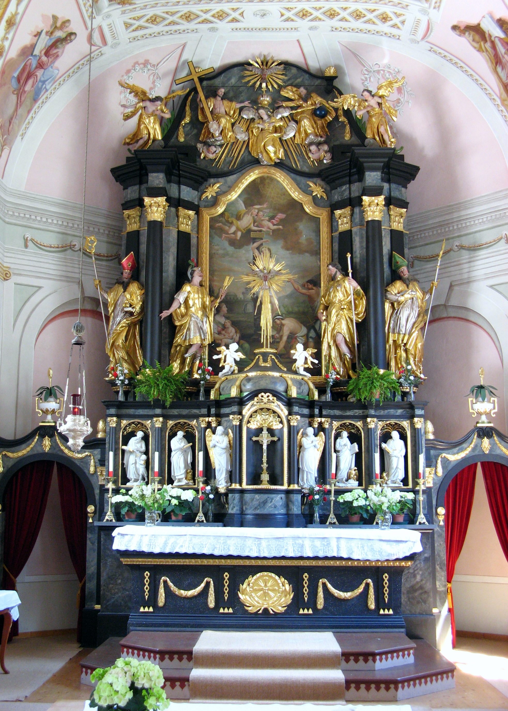 Hll. Sebastian und Rochus von Joseph Clemens Witwer am Hochaltar der Expositurkirche von Hägerau (Tirol)